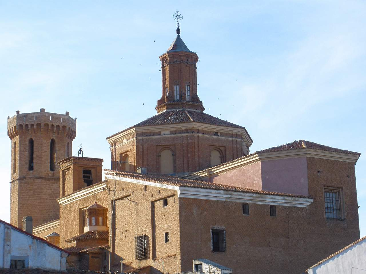 Iglesia de Nuestra Señora de la Asunción (Cariñena, Zaragoza)